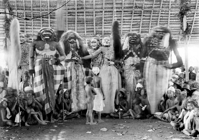 Negatief. Acteurs verkleed als reuzen en boze geesten Unknown language: Barong Landung; Jero Gede (zwarte maskers) en Jero Luh (witte maskers)